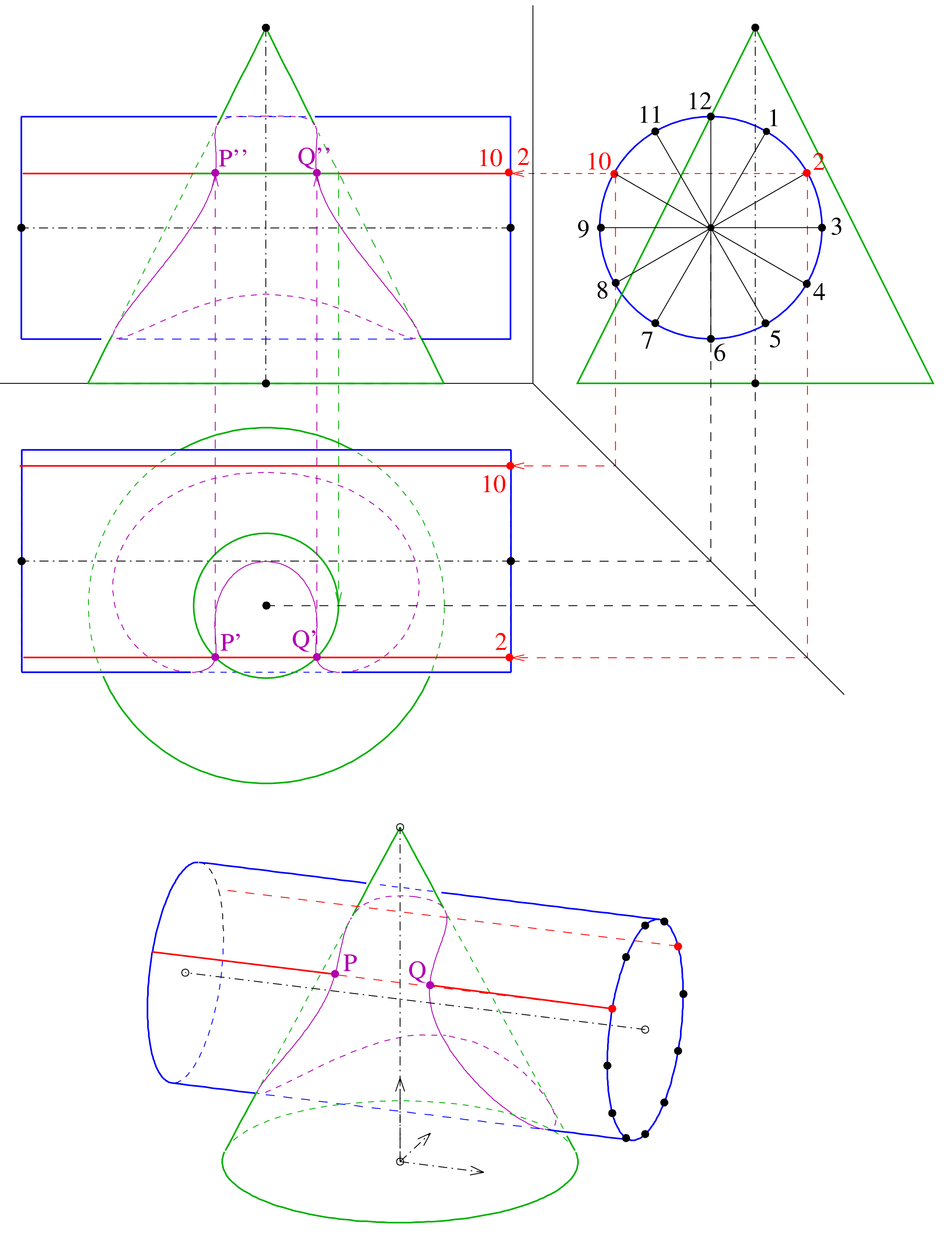 Schnitt Kegel - Zylinder: Mantallinienverfahren